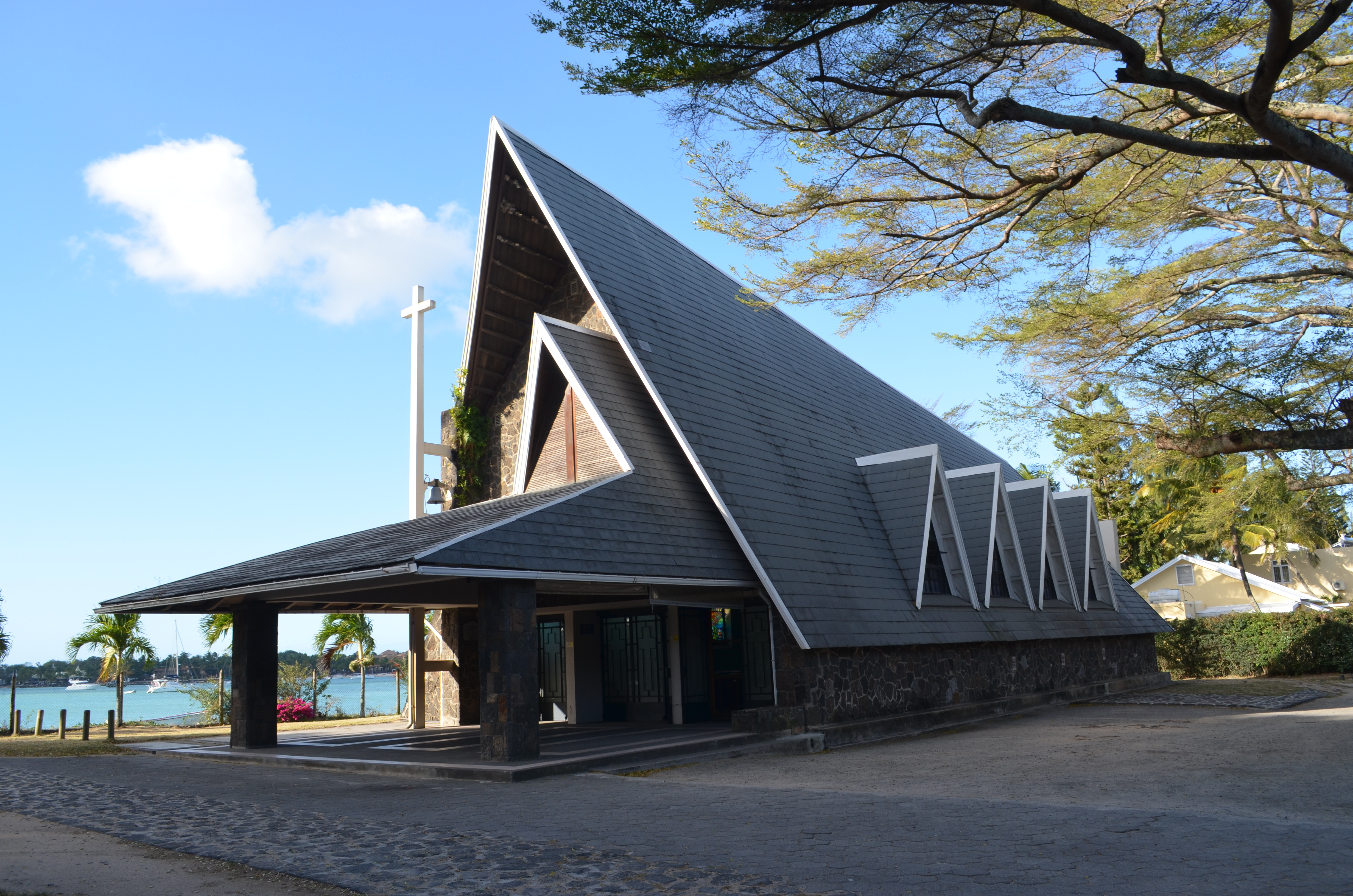 Grand Baie, catholic church